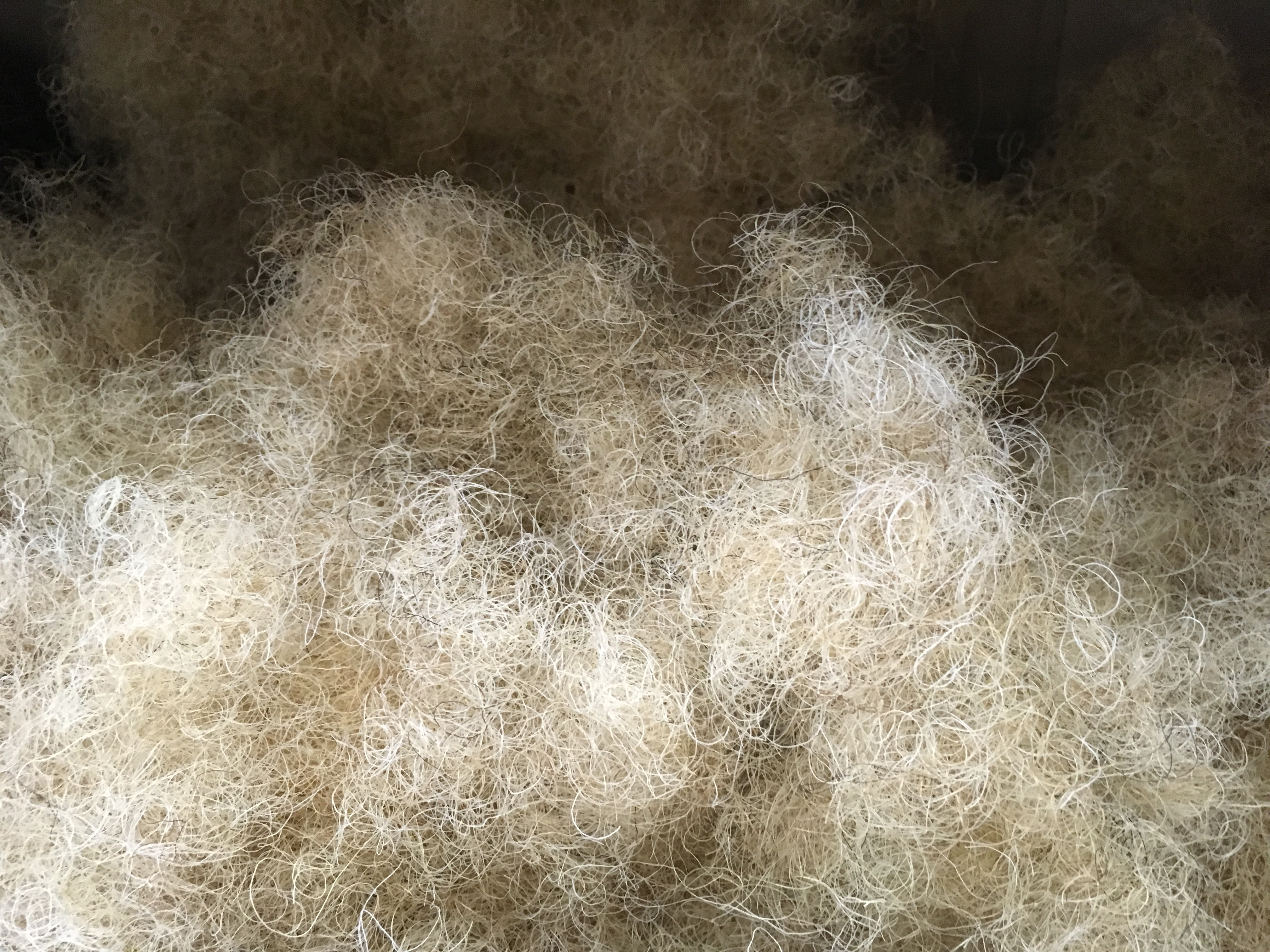 Crin de cheval blond pur queue. Le crin est étuvé à chaud et cardé.